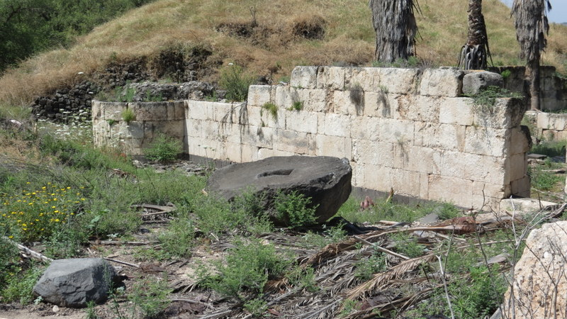 Horvat Minya Visit, Israel חורבת מיניה